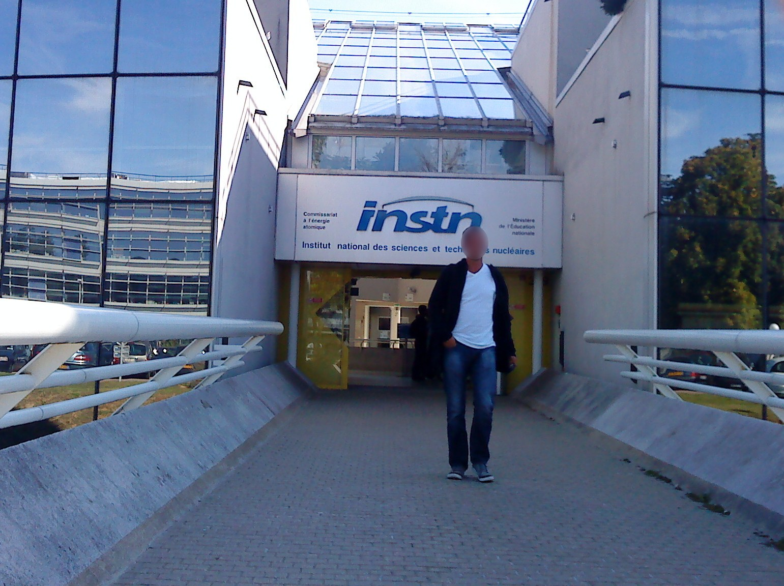 L'entrée principale de l'INSTN